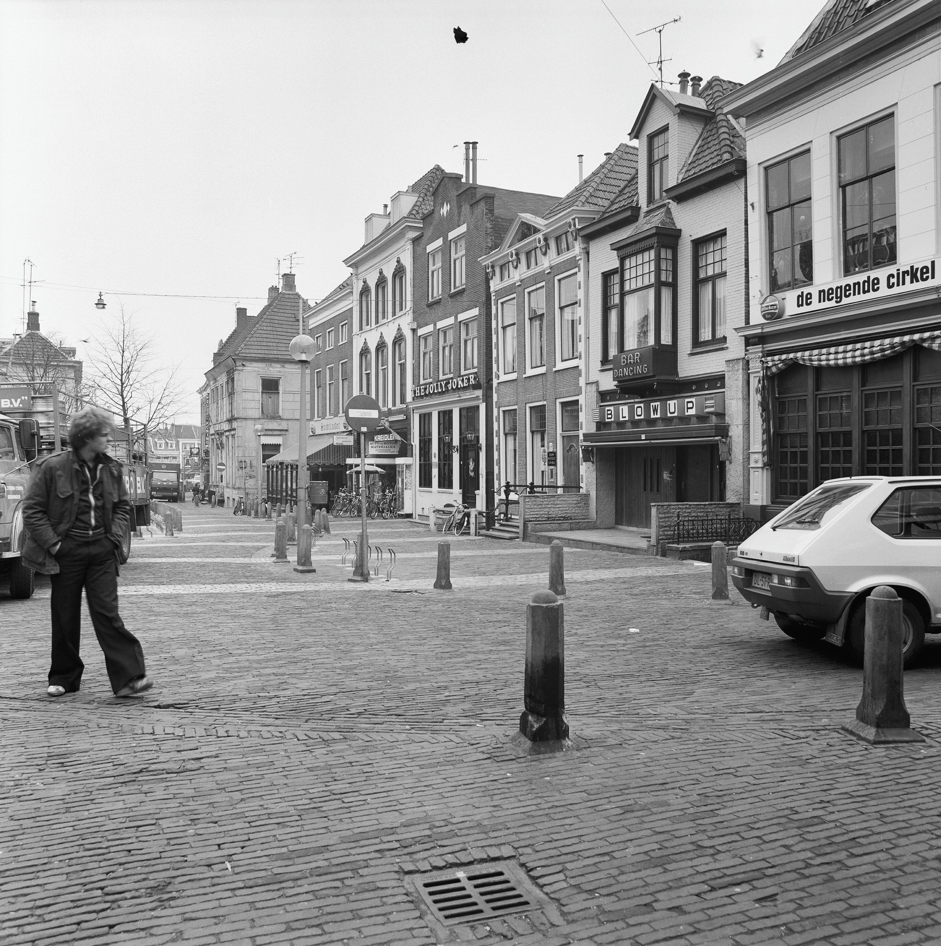 Het brede deel van de Poelestraat in Groningen